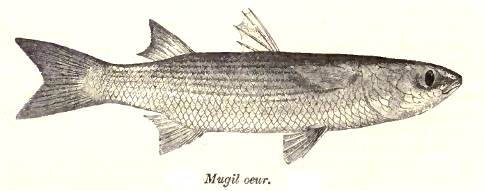 Mugil oeur = Mugil cephalus Linnaeus, 1758